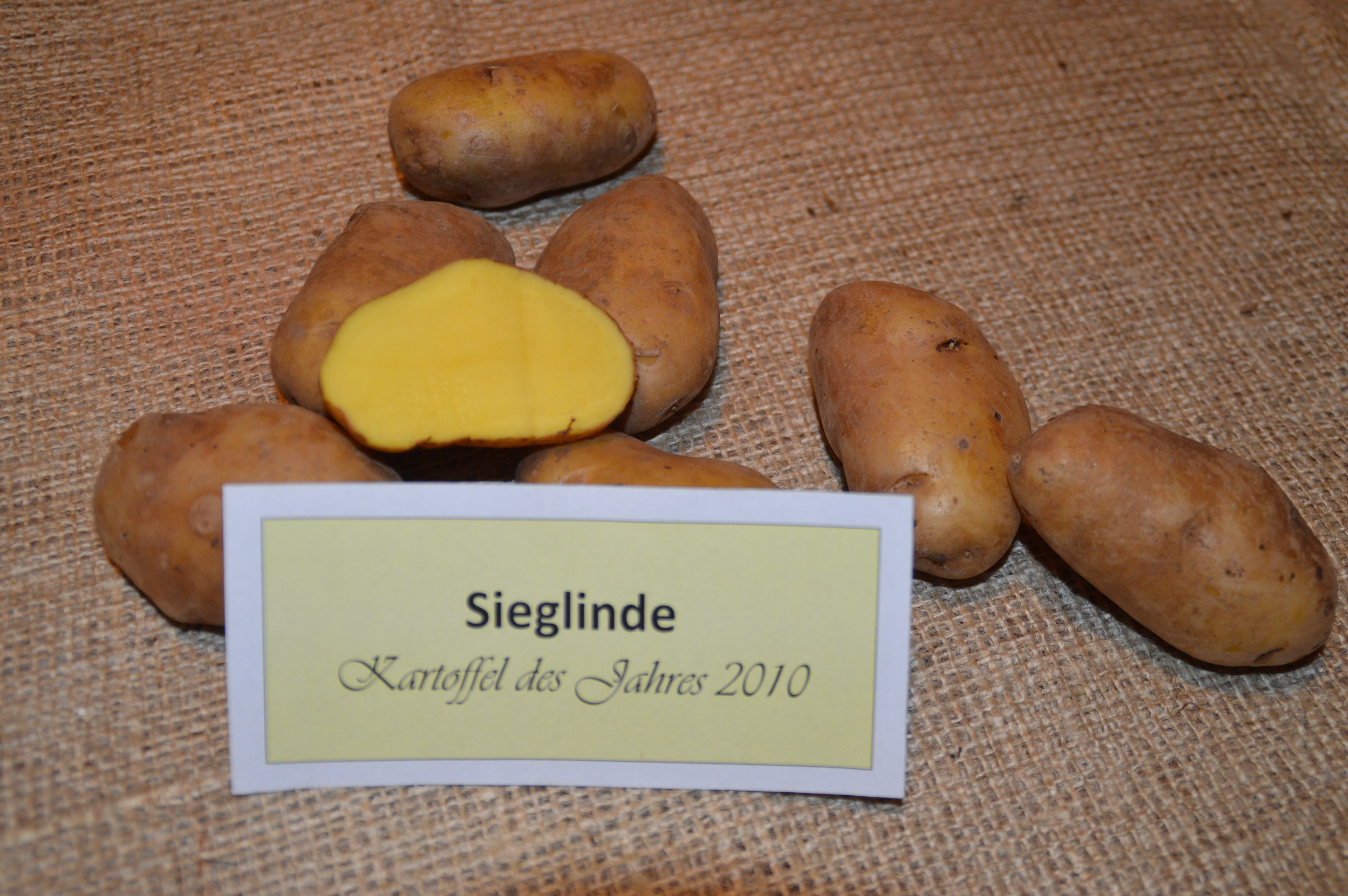 Sieglinde